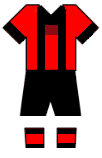 Equipacion futbol